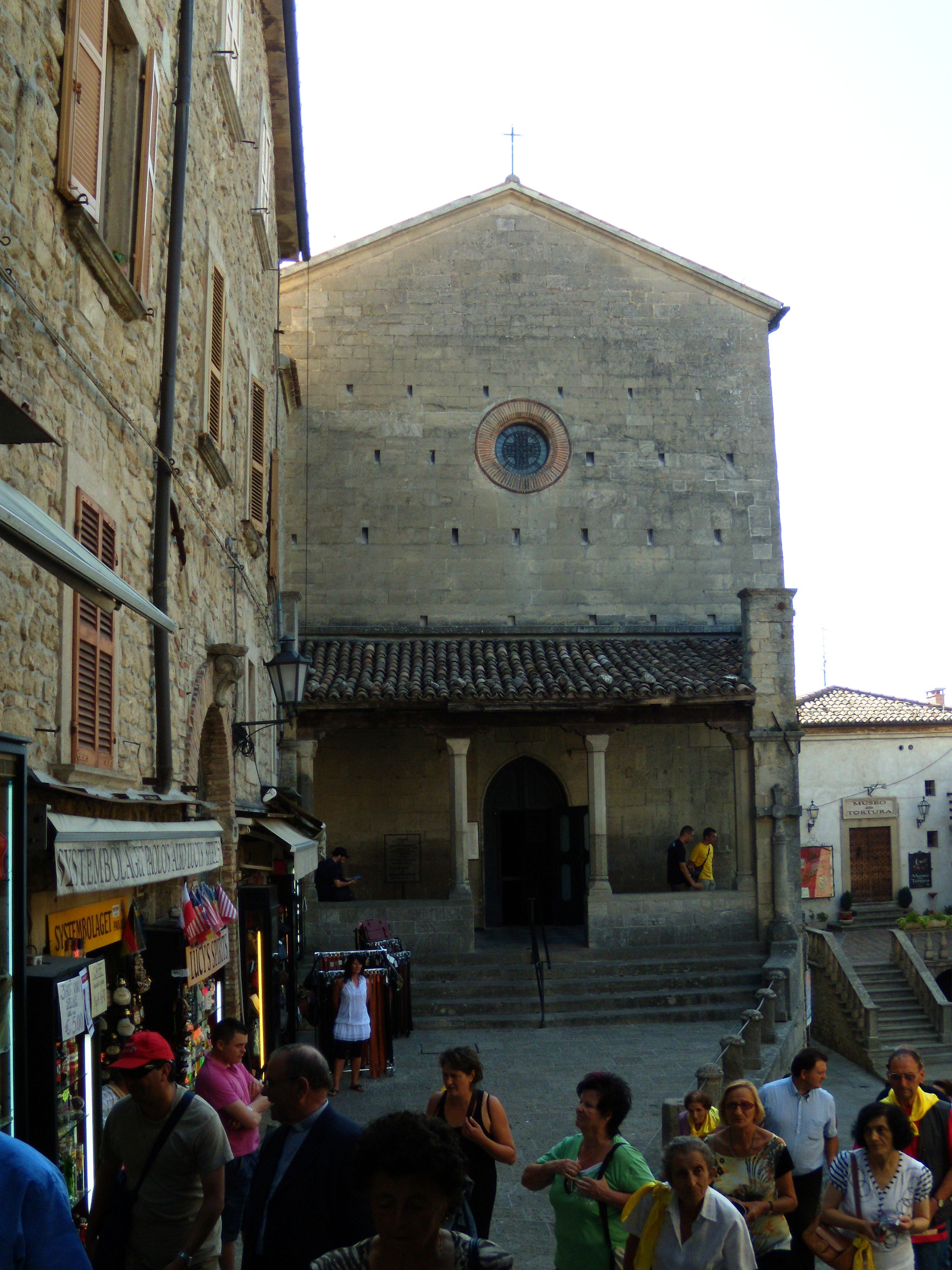 Chiesa di San Francesco a San Marino.